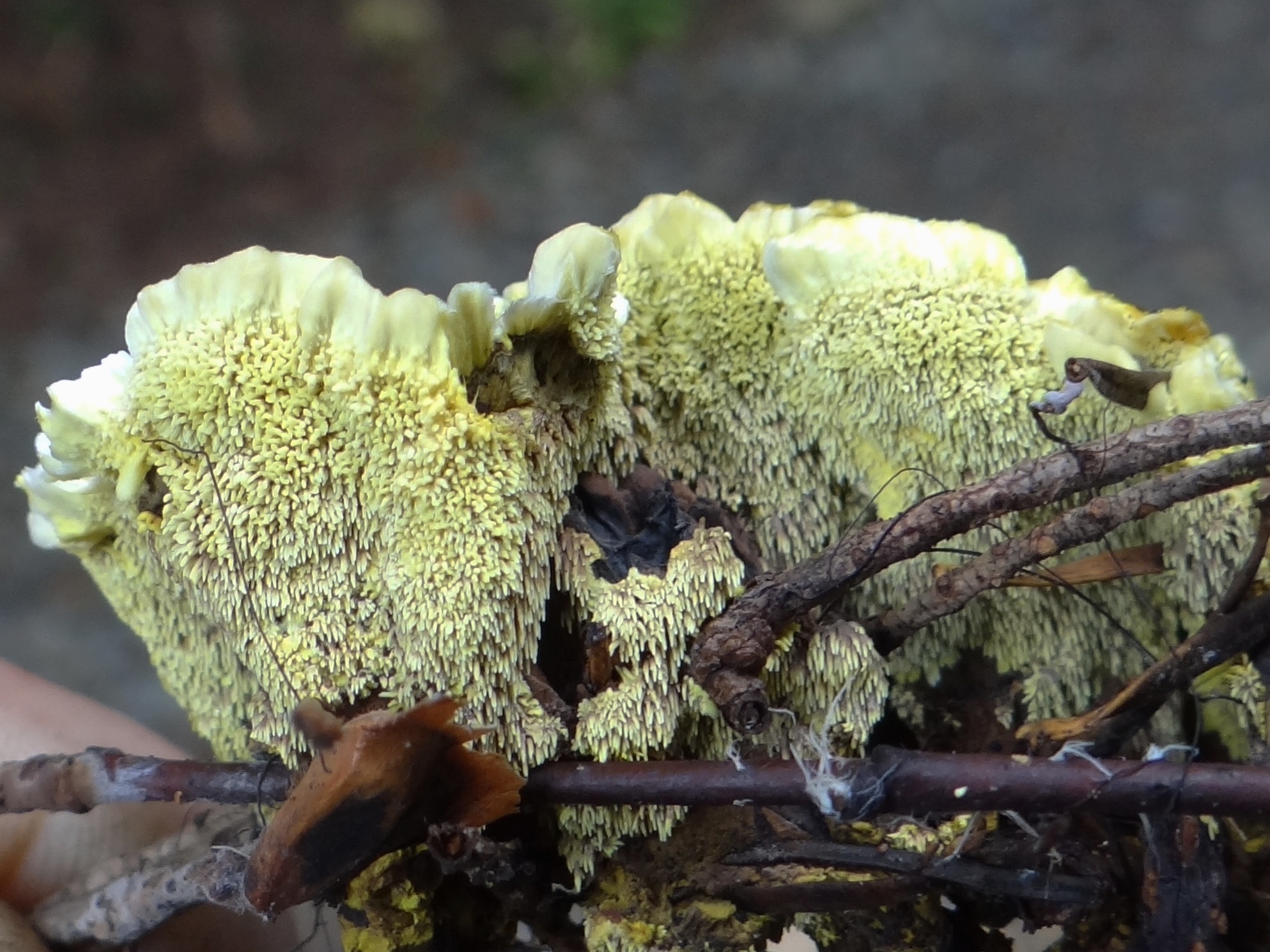 Hydnellum geogenium (location: Poland, Zawoja-Markowa)